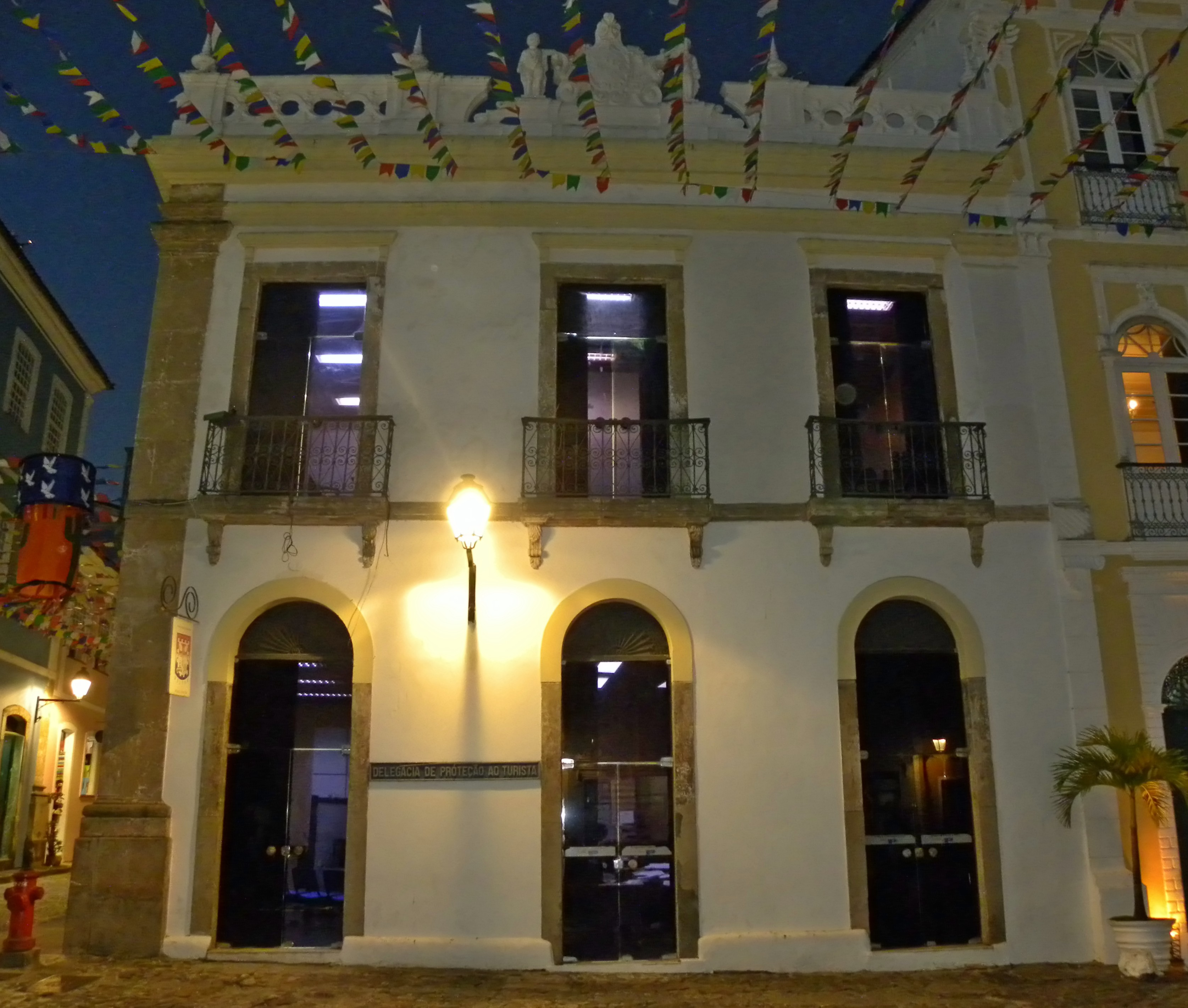 Delegacia de Proteção ao Turista de Salvador - Estado da Bahia